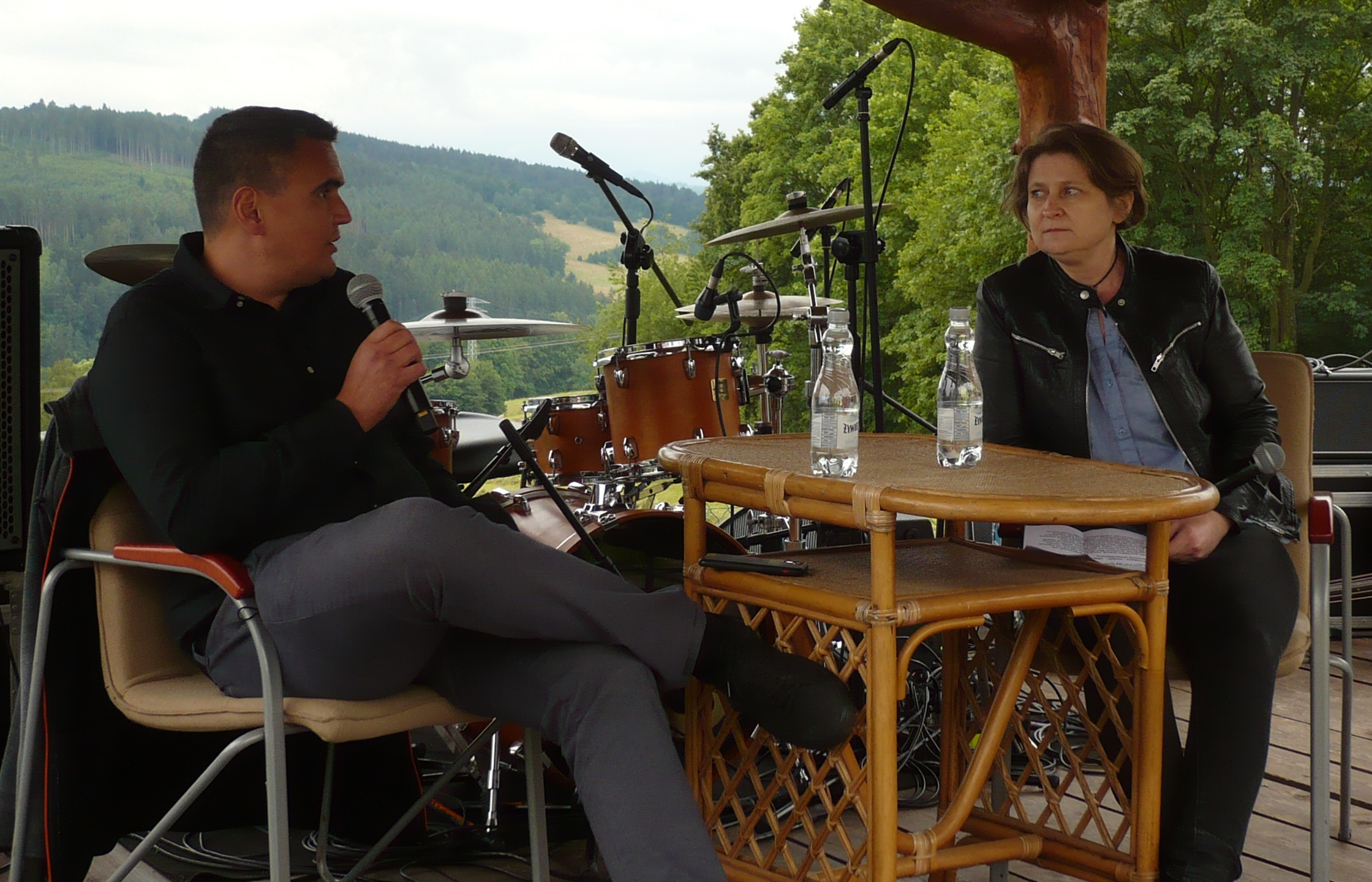 Marcin Drąg i Beata Kłosowska Tyszka, VI Festiwal Góry Literatury, 2020